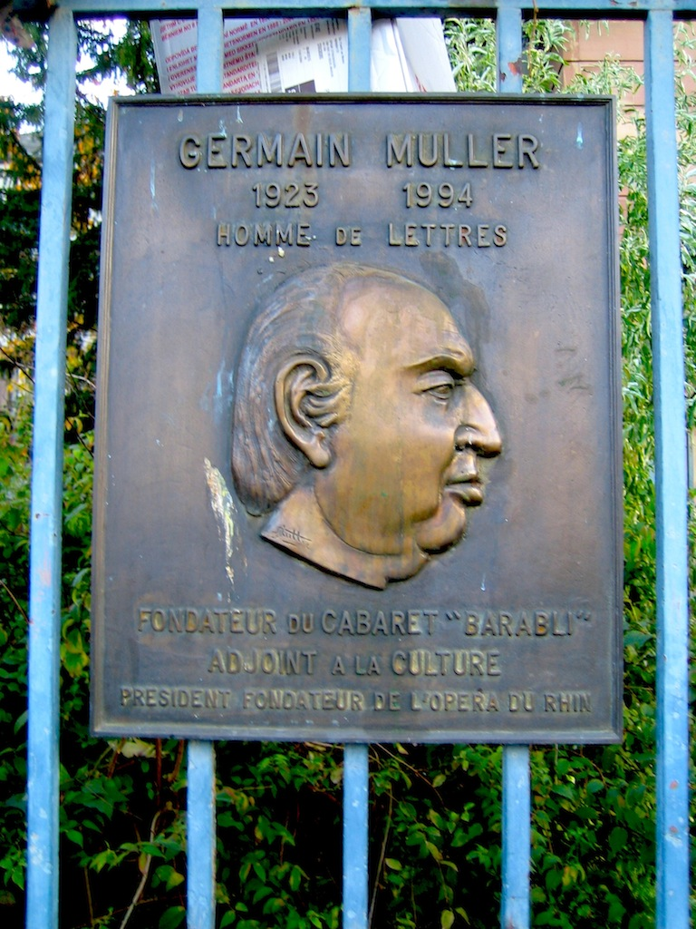 Strasbourg, plaque commémorative à la mémoire de Germain Muller